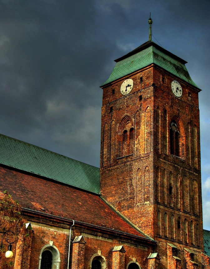 Żagań - dawny kościół klasztorny augustianów (obecnie parafialny p.w. Wniebowzięcia NMP), XIV, 2 poł. XV, 1515-1516